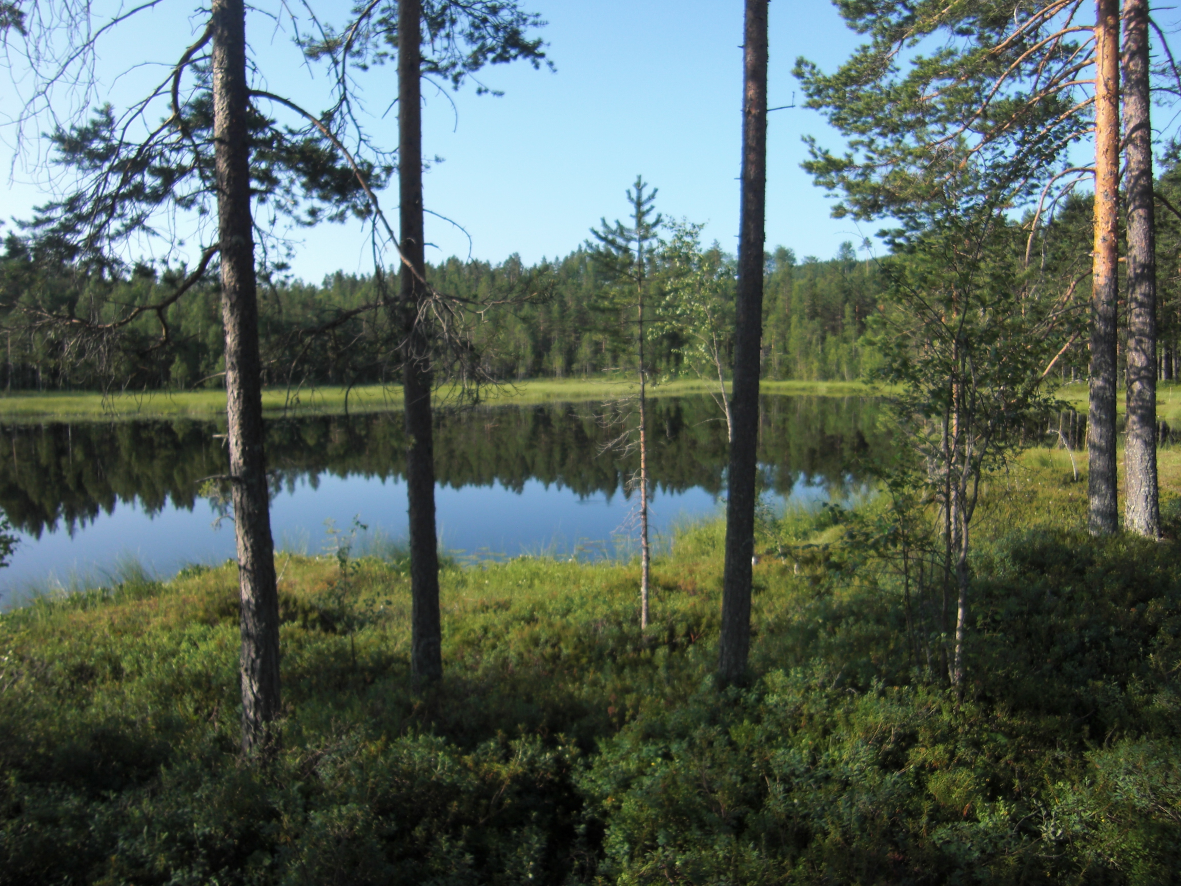 Iglatjärn 2013-07-13